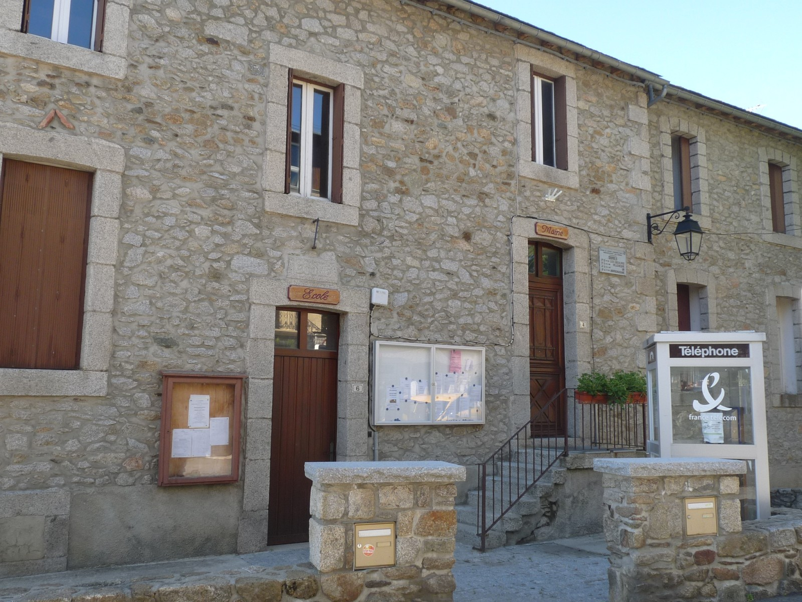 Mairie-école de Dorres, P.O., France